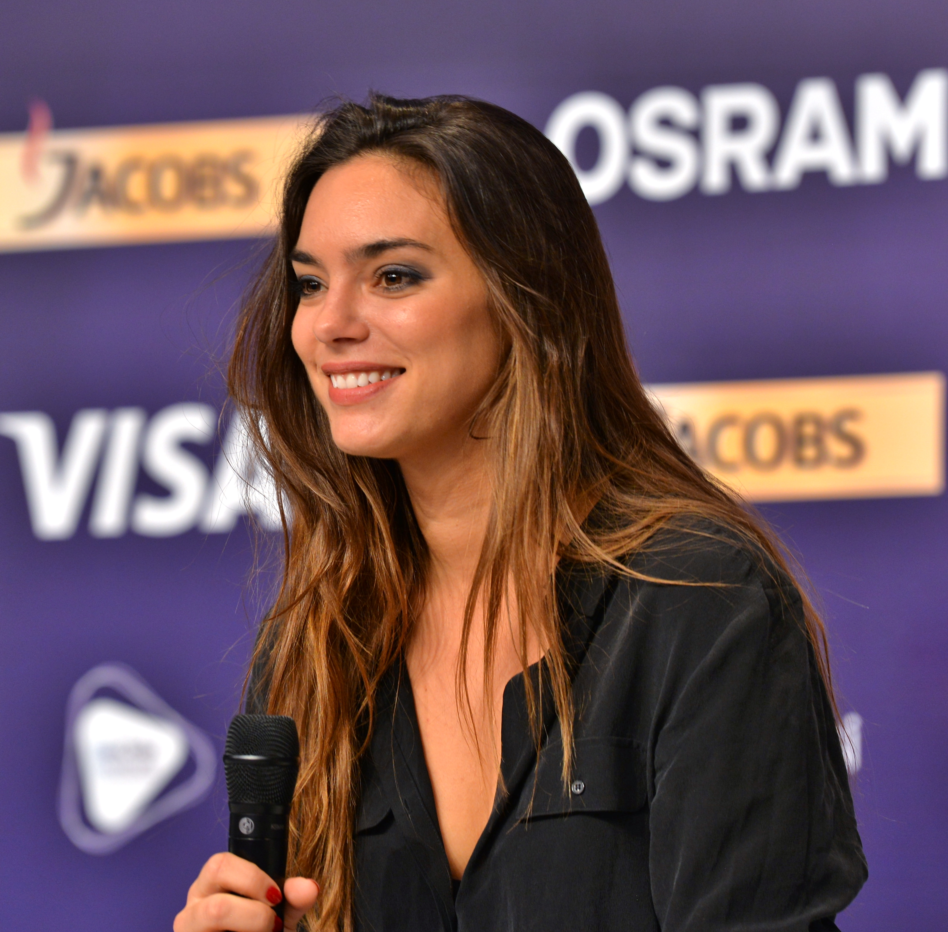 Французька співачка Альма (Alexandra Maquet) на пісенному конкурсі Євробачення в Києві 2017